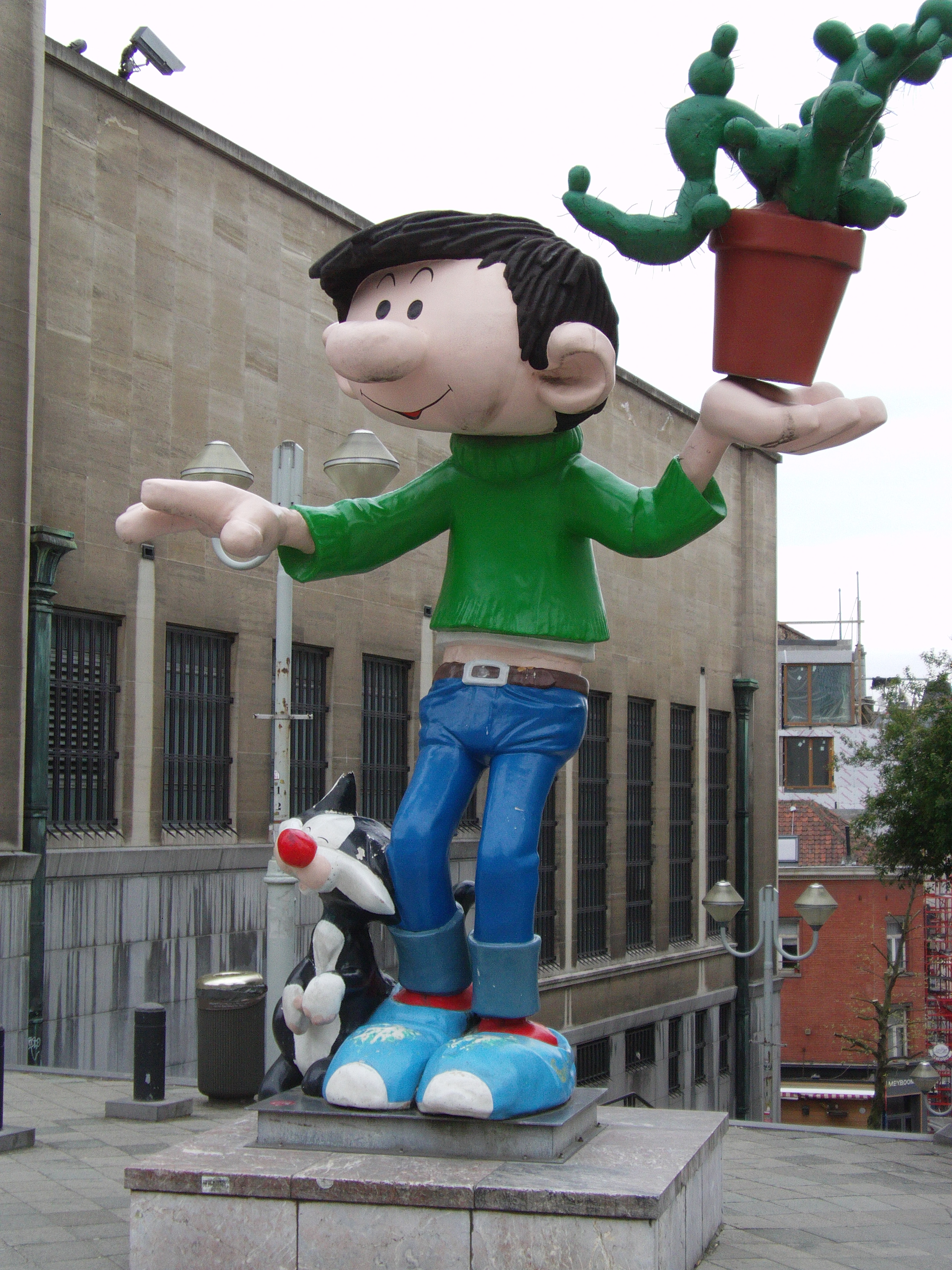 Statue BD Gaston Lagaffe | Franquin | Bruxelles Pentagone